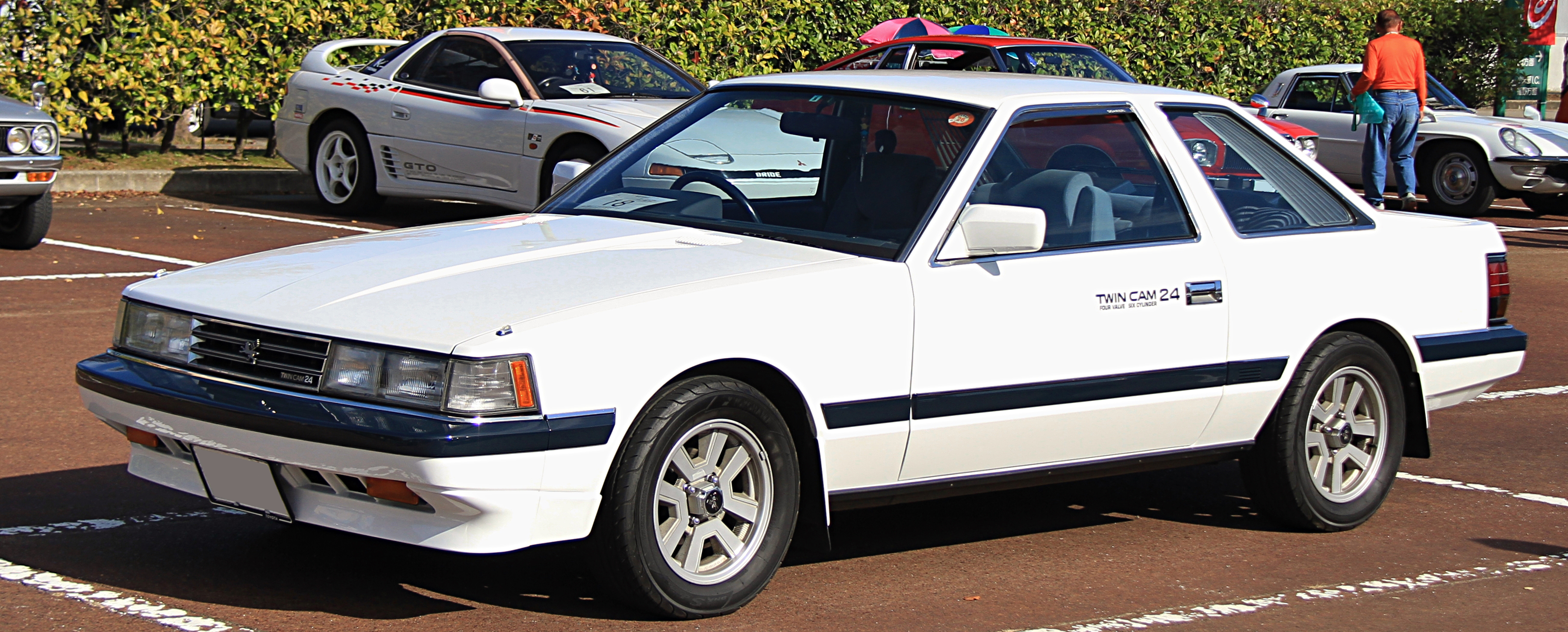 Toyota GZ10